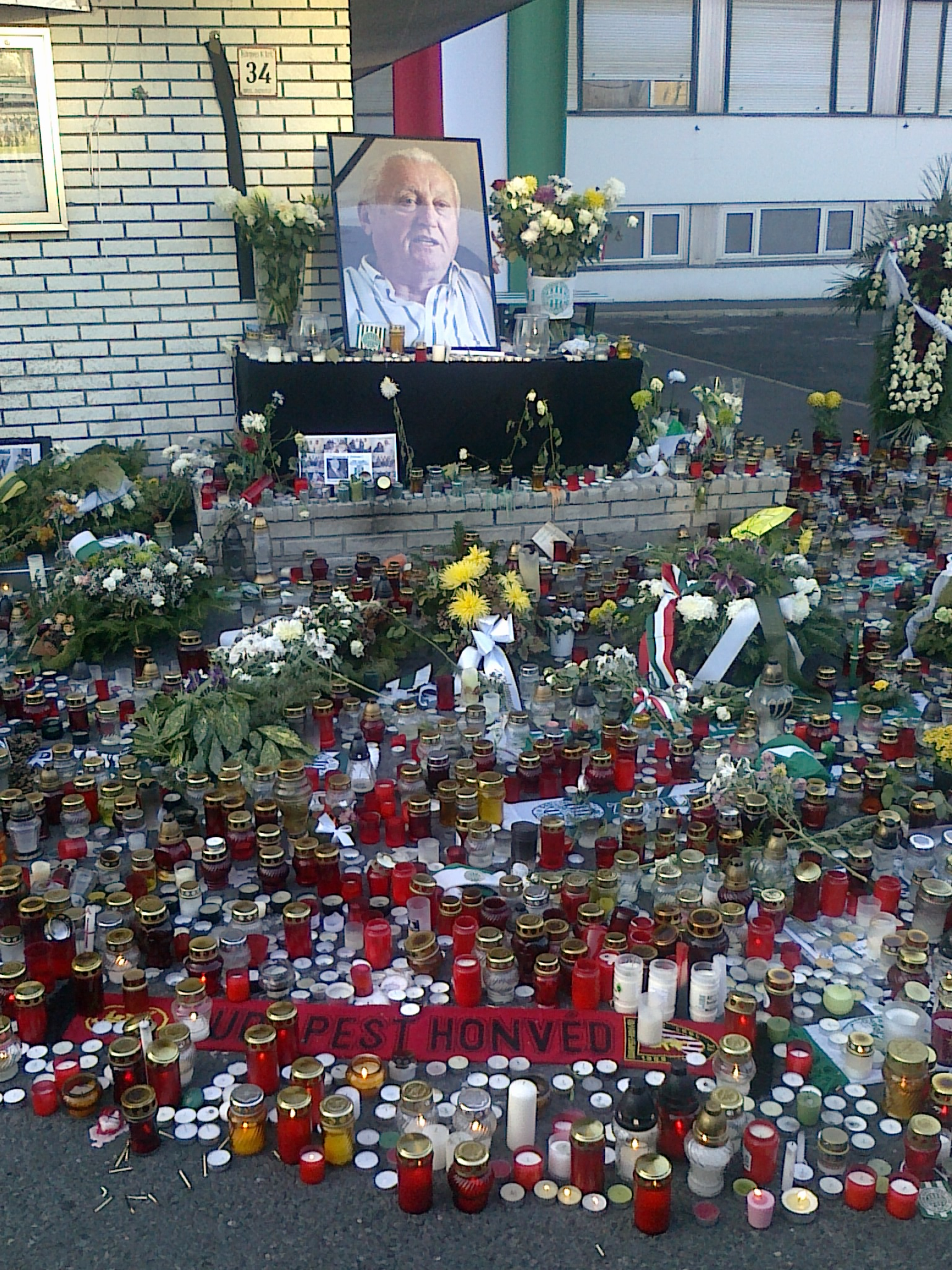 Albert Flórián halálát követően a részvétet nyílvánítók mécsesei a róla elnevezett stadion oldalában.